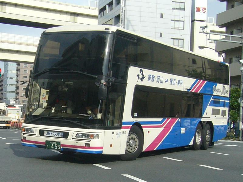 登録番号 岡山200か・453 中国ジェイアールバスの高速バス「京浜吉備ドリーム号」 三菱ふそう・エアロキング MU612TX 現在の塗色